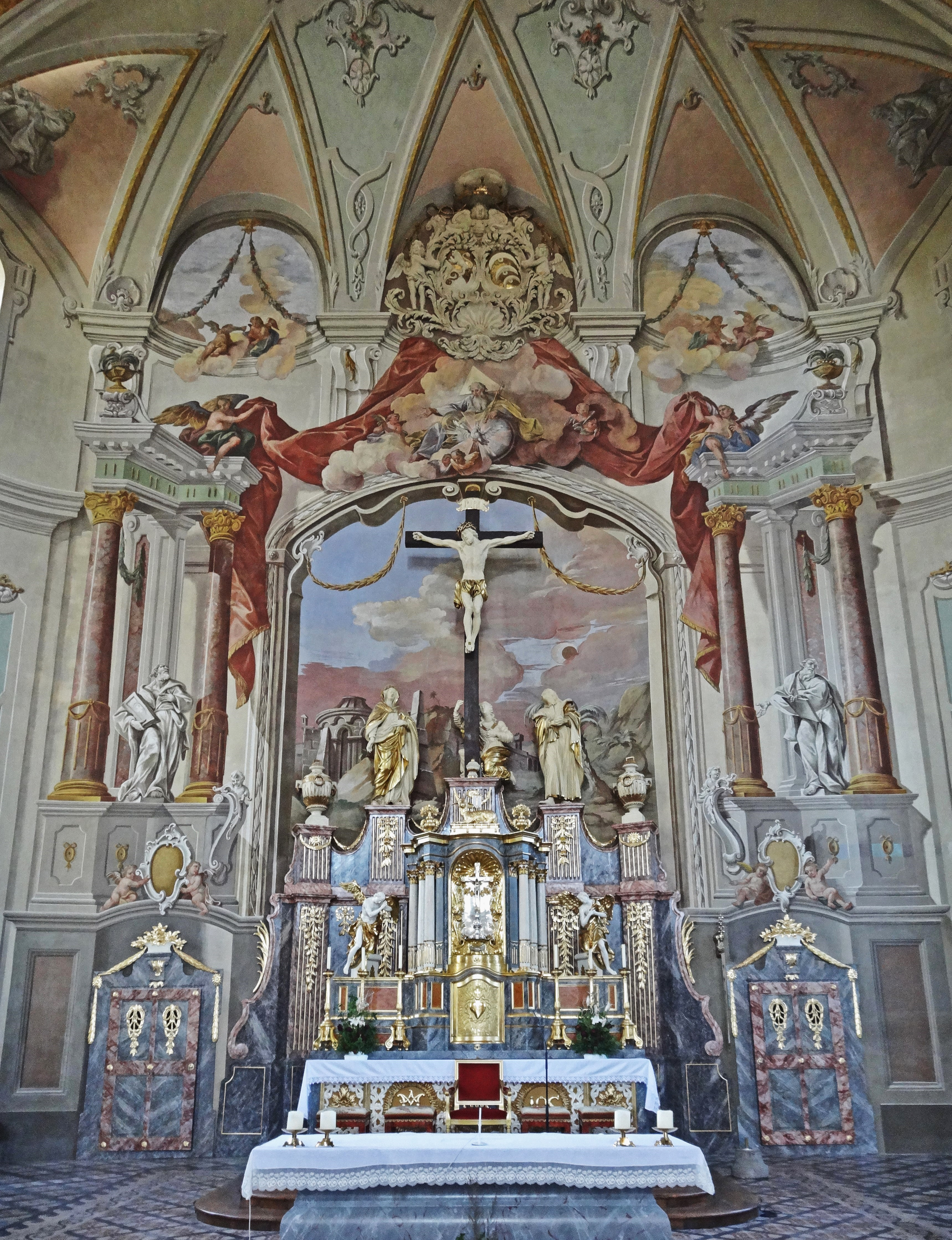 Wallfahrtskirche Maria Loreto (St. Andrä Im Lavanttal), der Hochaltar